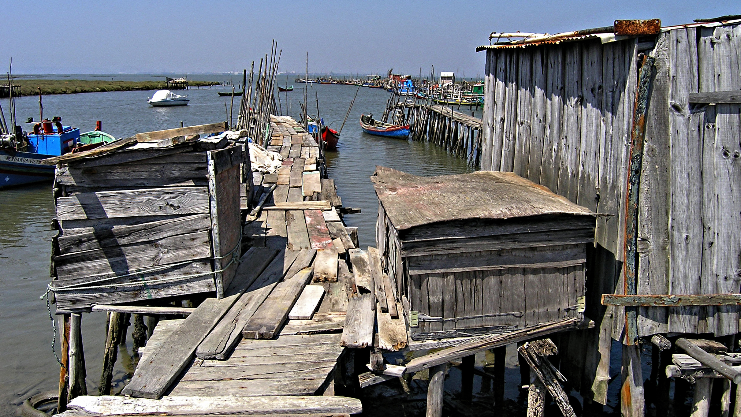 Cais Palafítico da Carrasqueira